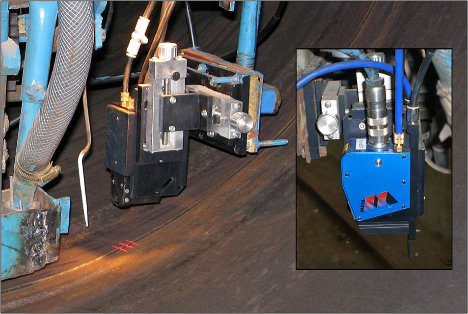 Lichtschnittsensor Meta Vision Systems